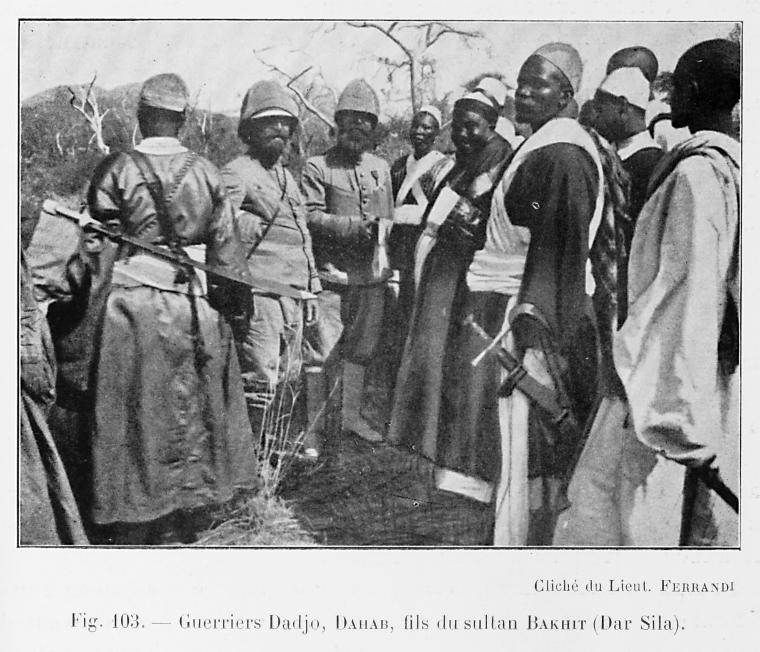 Guerriers Dadjo, Dahab, fils du sultan Bakhit (Dar Sila). From L'Afrique Équatoriale Française: le pays, les habitants, la colonisation, les pouvoirs publics. Préf. de M. Merlin. Avec 186 reproductions photographiques, 33 diagrammes, profils, et 7 cartes dont 5 en couleurs, (published 1918).